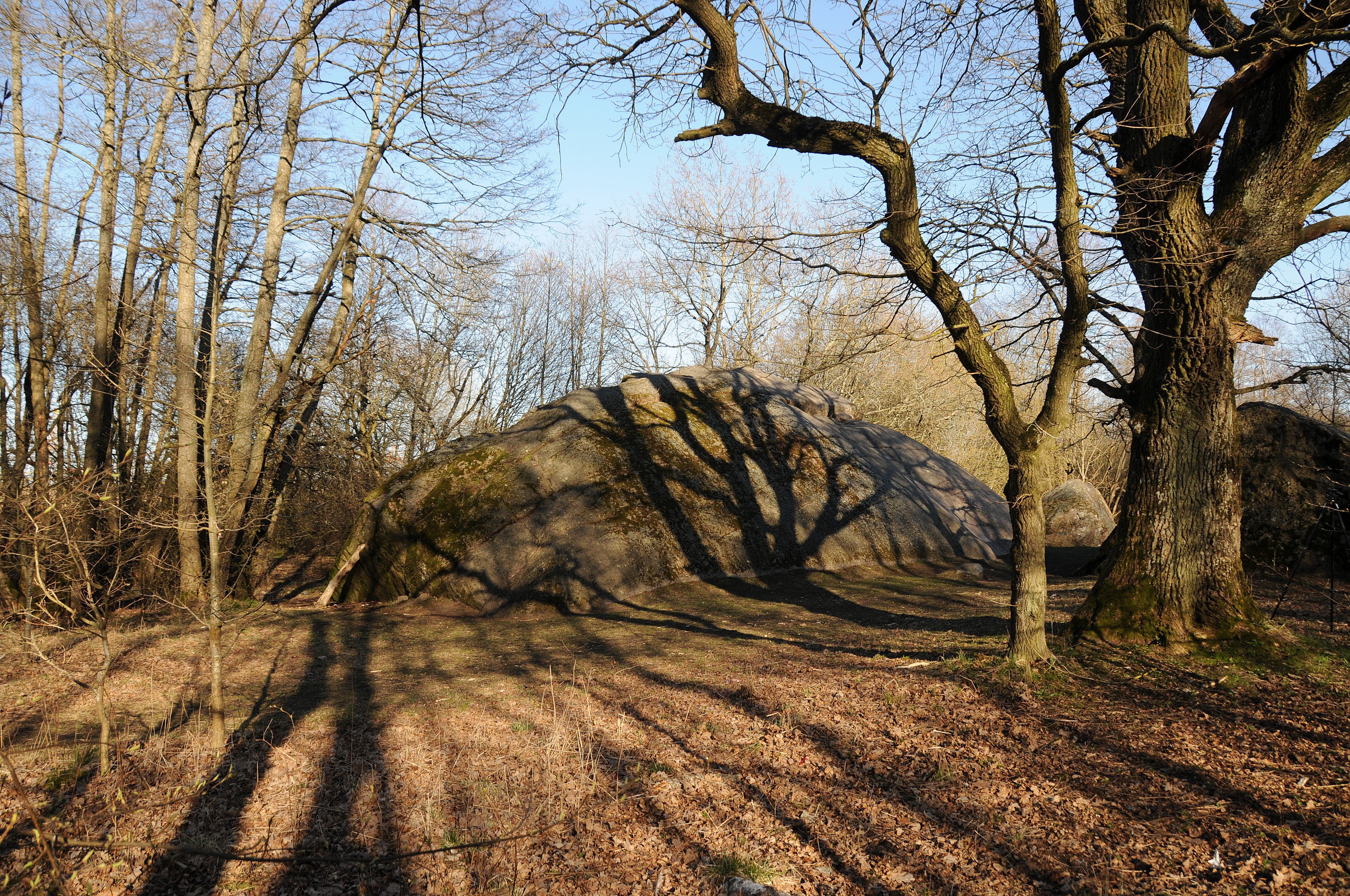 Muuga Kabelikivi (ka Muuga Liukivi). Foto Martin Suuroja, pildistatud 9. aprillil 2020. aastal.